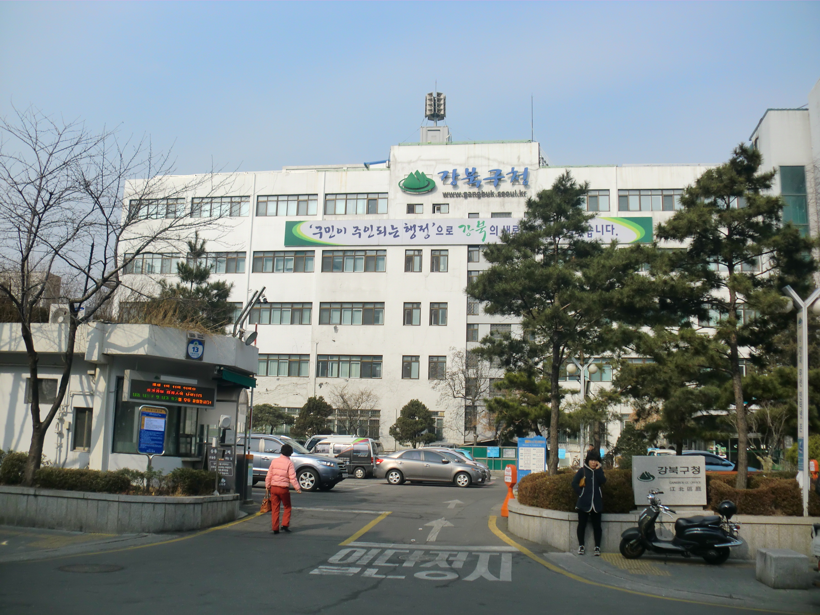 서울특별시 강북구에 있는 강북구청